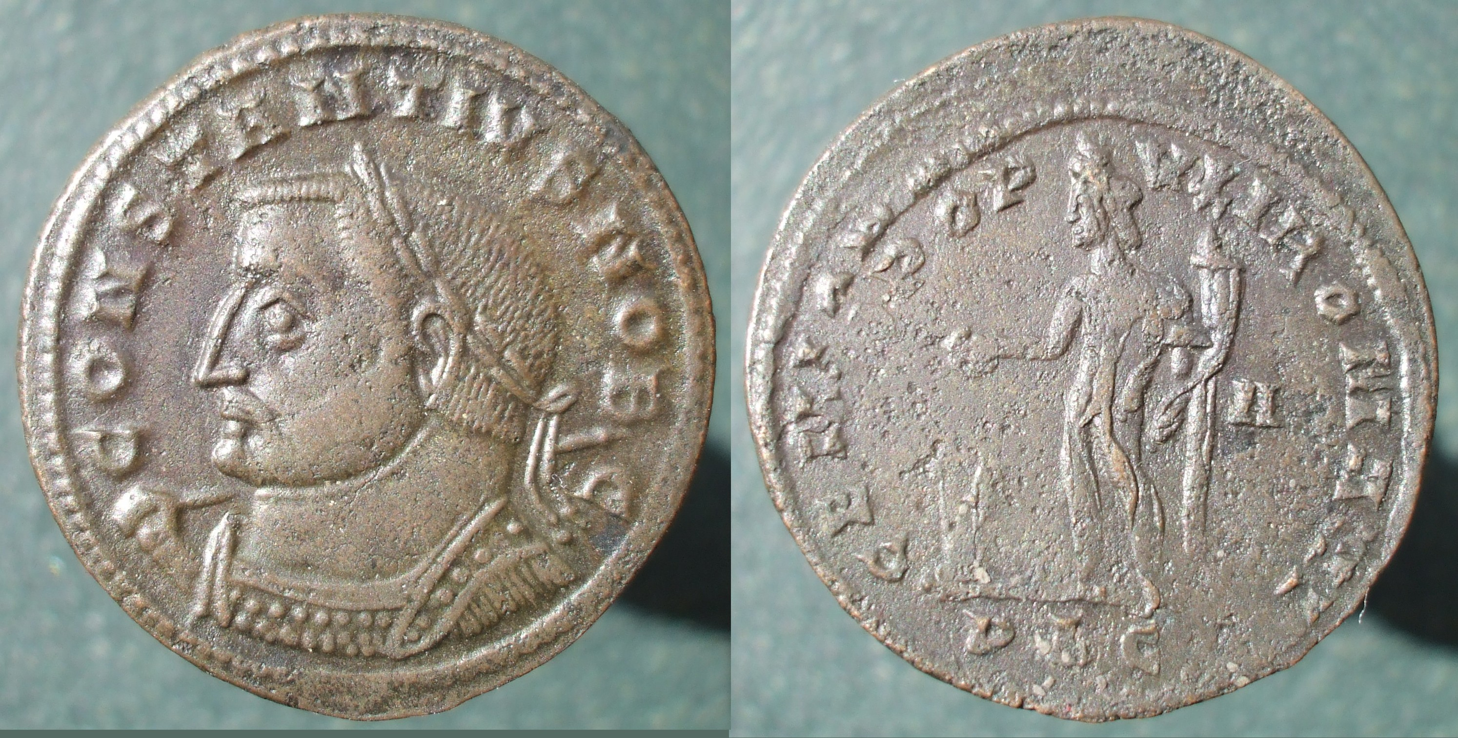 nummus de Constance Chlore, Tétrarchie, Génio Populi Romani